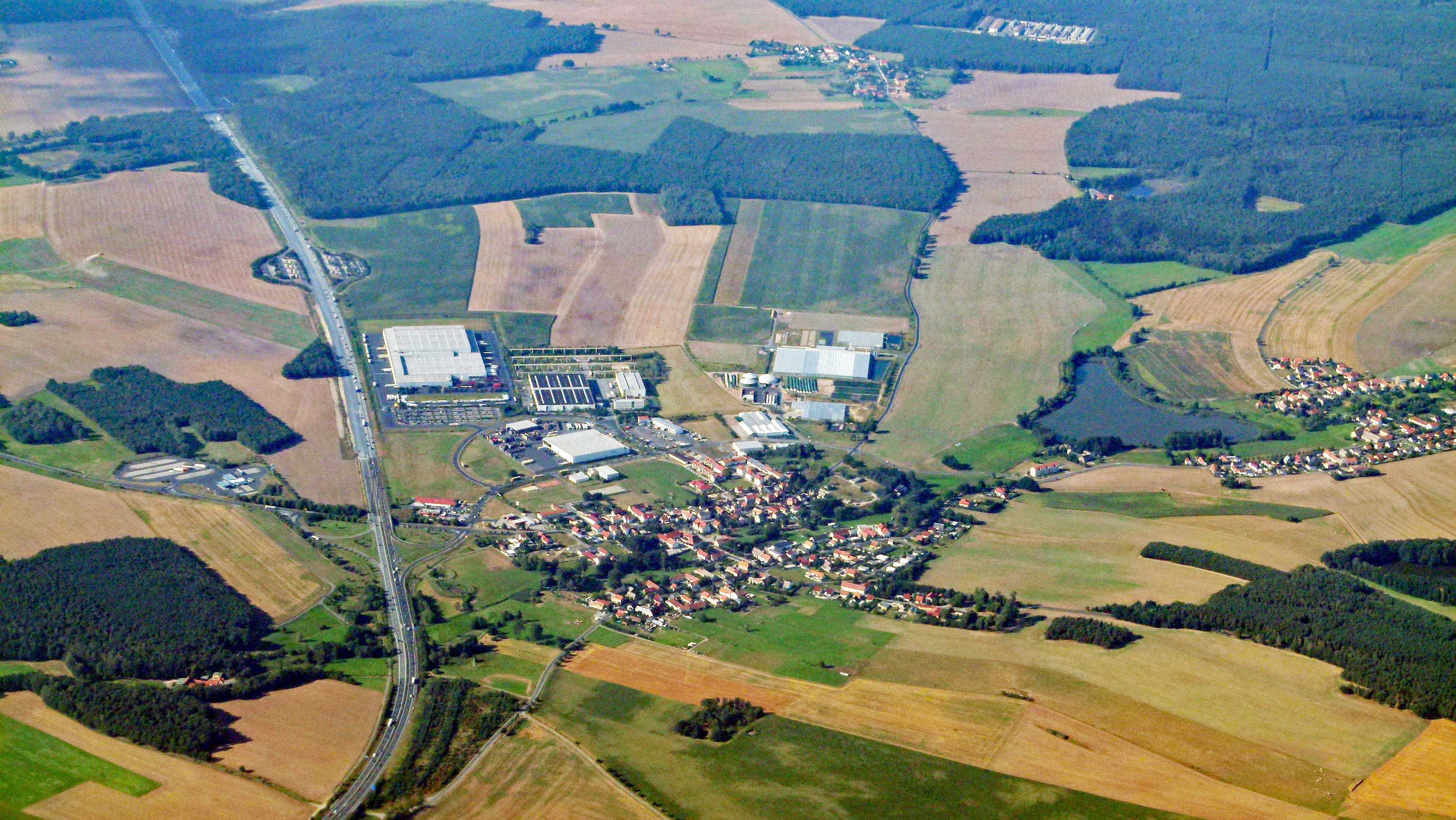 Blick auf Thiendorf vom Flugzeug aus